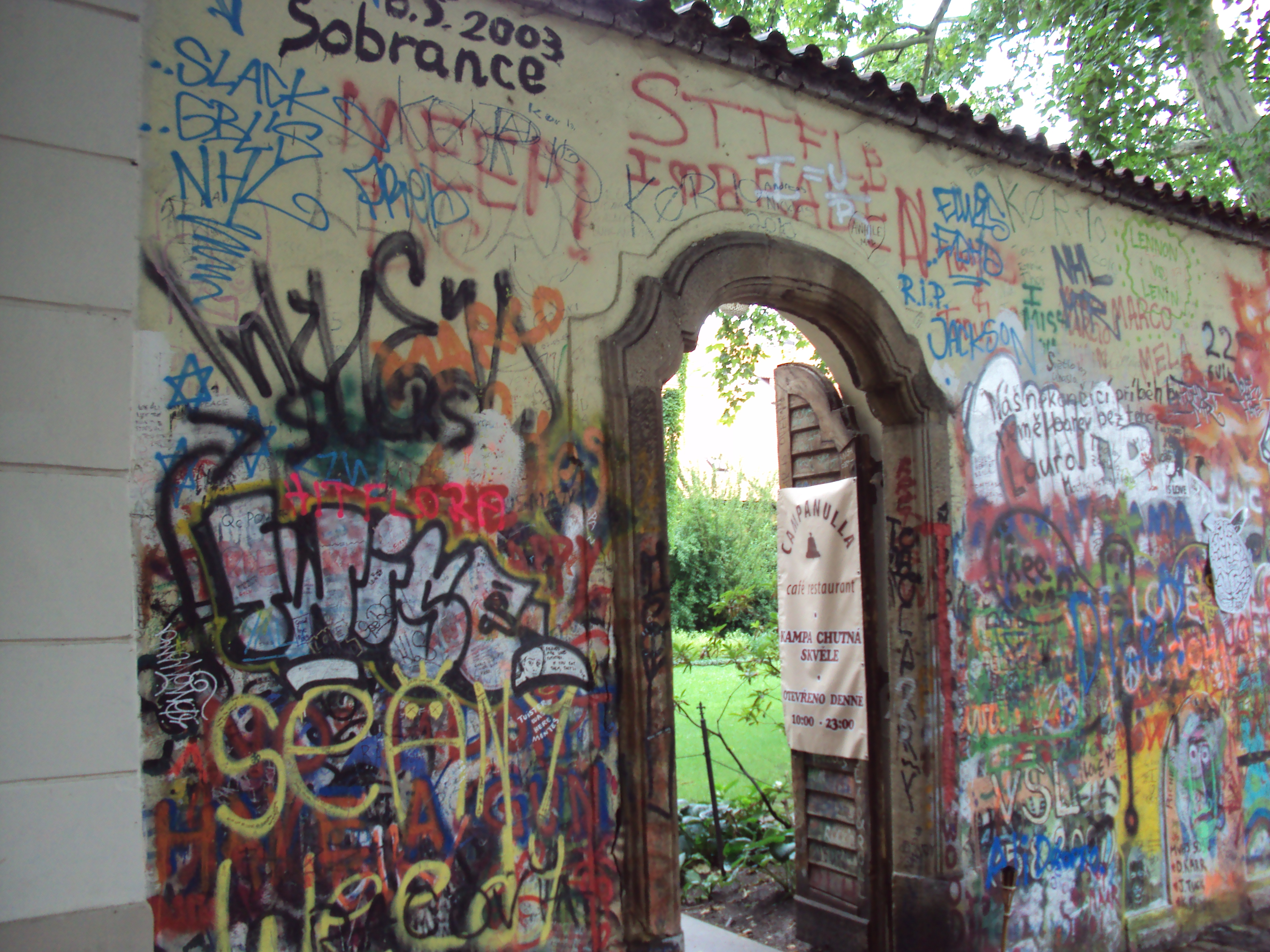 Lennonova zeď v Praze na Kampě